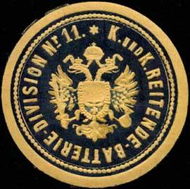 Sealing stamp Title: K. und K. Reitende-Batterie-Division Nr. 11 Description: gelb, schwarz, geprägt Place: size: 4 cm